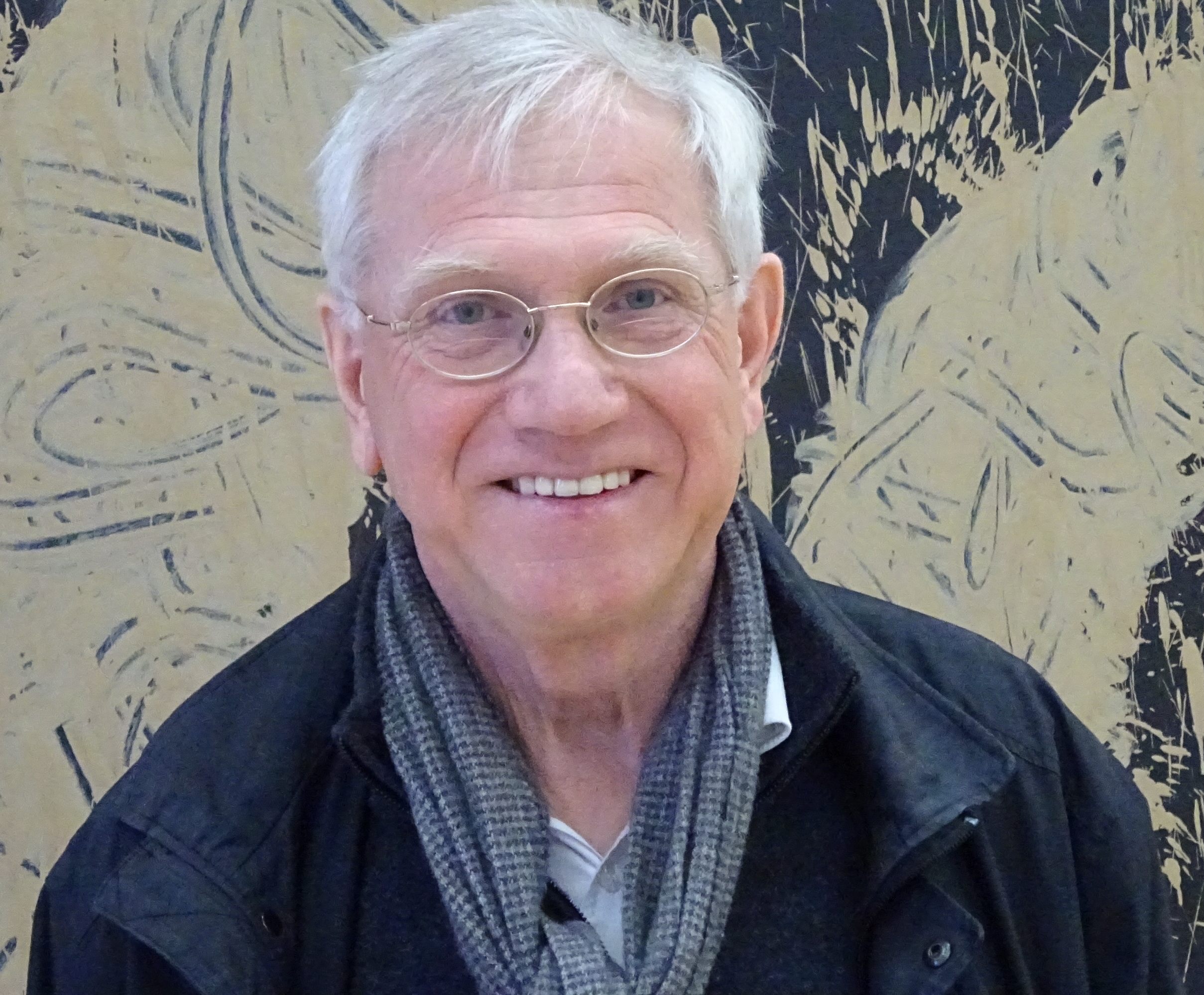 Guido de Werd, voormalig directeur van Museum Kurhaus in Kleef, voor een muurschildering van Richard Long